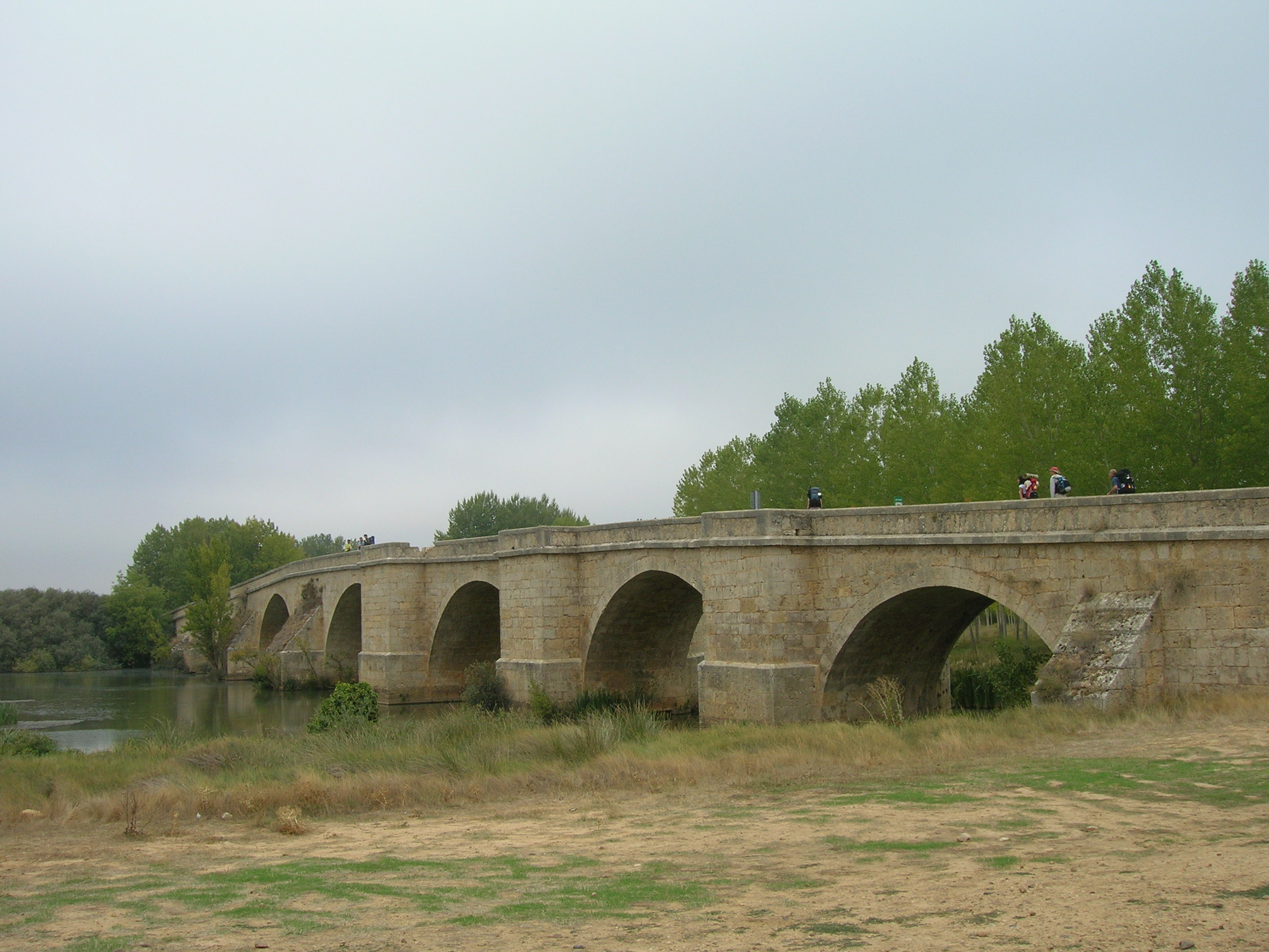 Con sus once ojos has estado viendo pasar las tranquilas aguas del río Pisuerga mientras ha sido pisado por los pies cansados de los peregrinos desde el siglo XI. Una vez lo hemos cruzado, dejamos la provincia de Burgos para entrar en la provincia de Palencia.